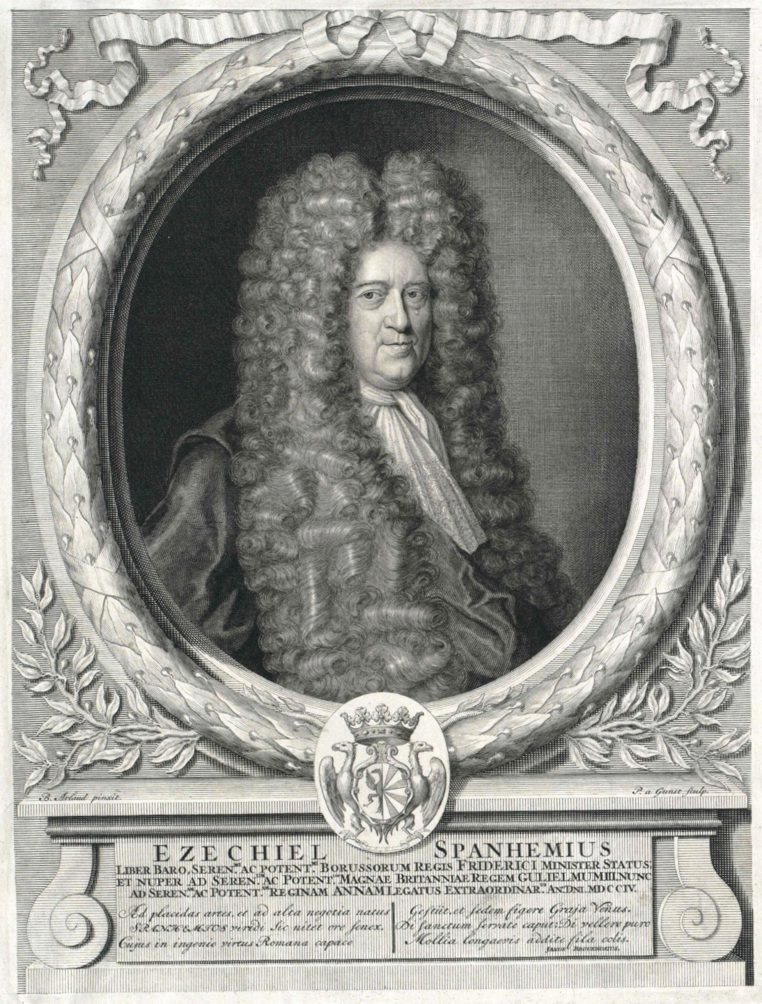 Ezechiel Spanheim (1629-1710)